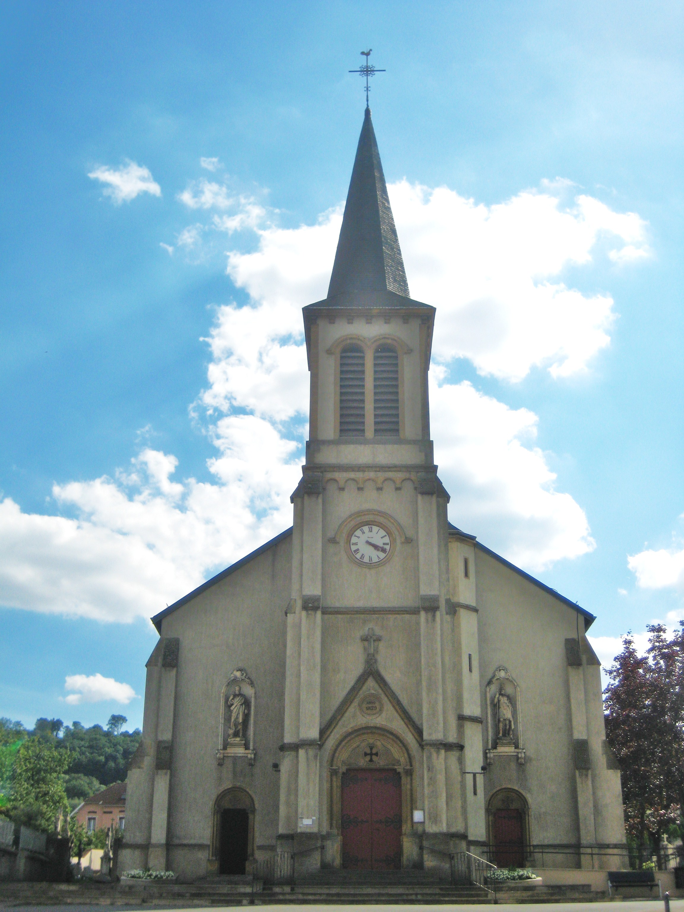 Description eglise paroissiale Saint-Joseph Sérémange Date25 aoûtSourcemon appareil photoAuthorAimelaimePermission(Reusing this file) eglise paroissiale Saint-Joseph Sérémange